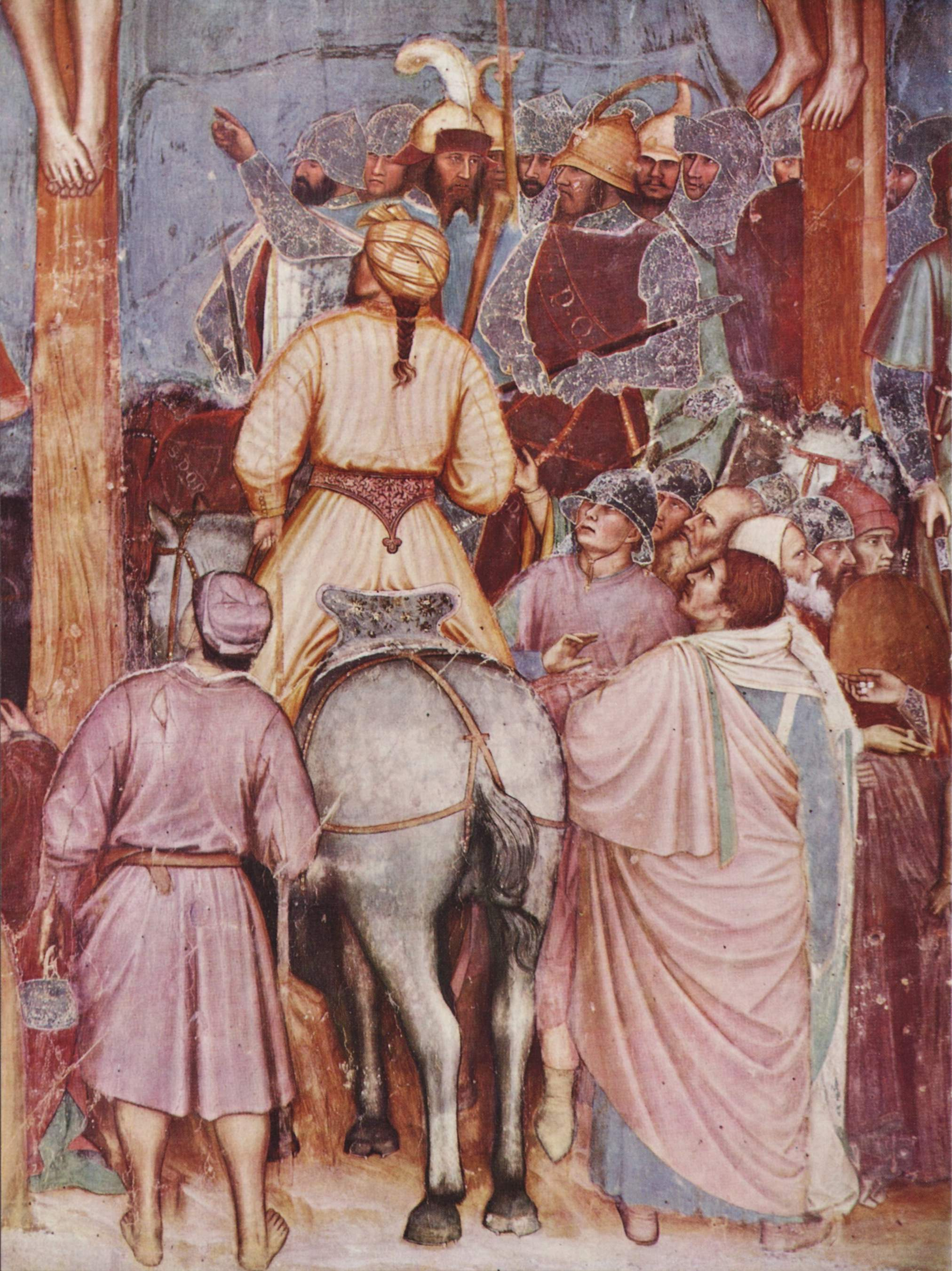 detail